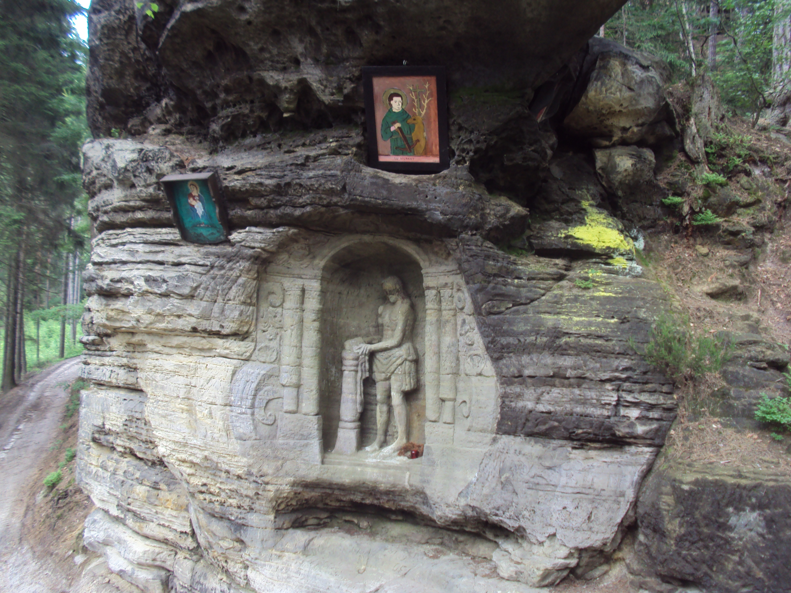 Vytesaná postava v Údolí samoty, při zelené trase